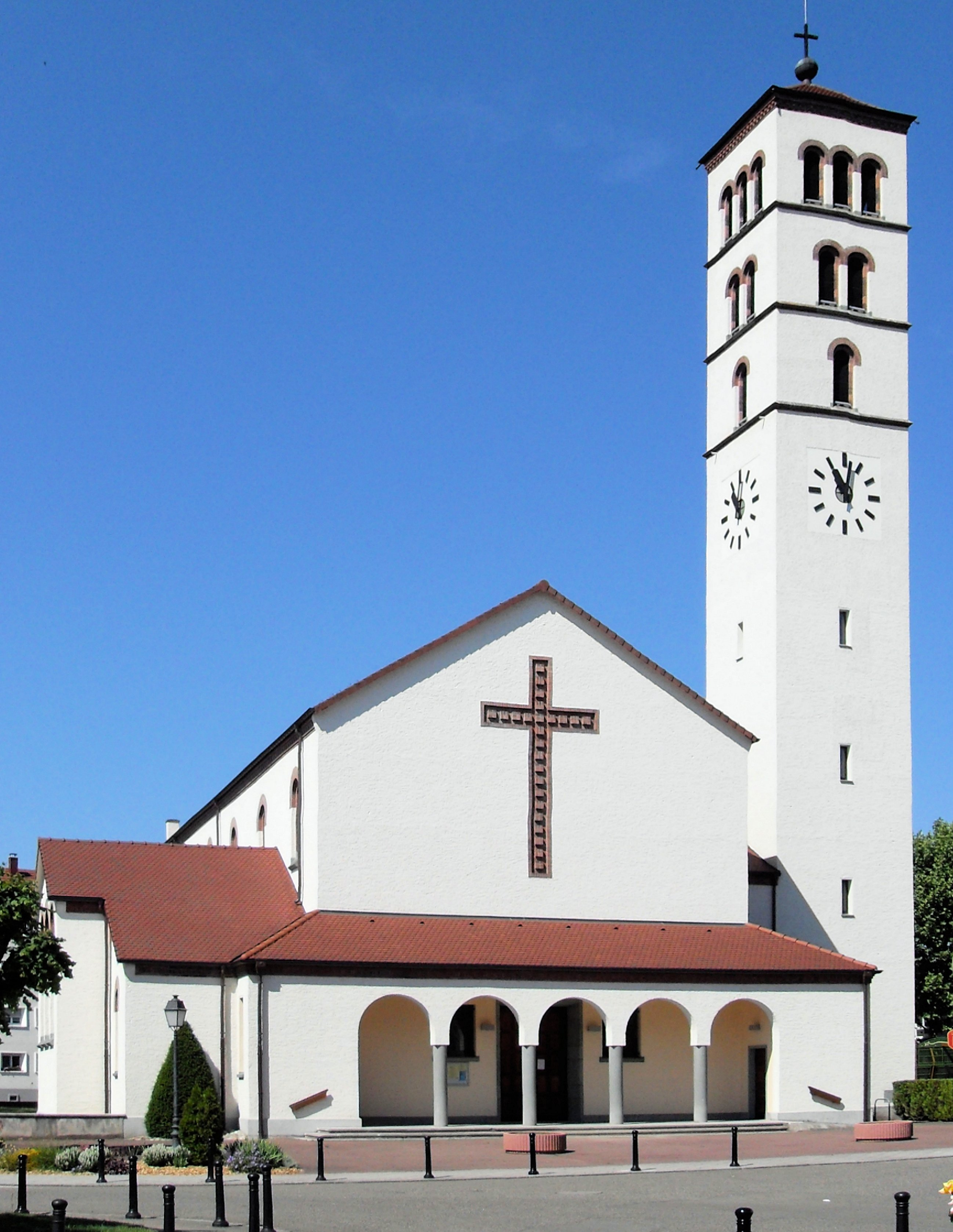 L'église du Christ-Roi à Huningue